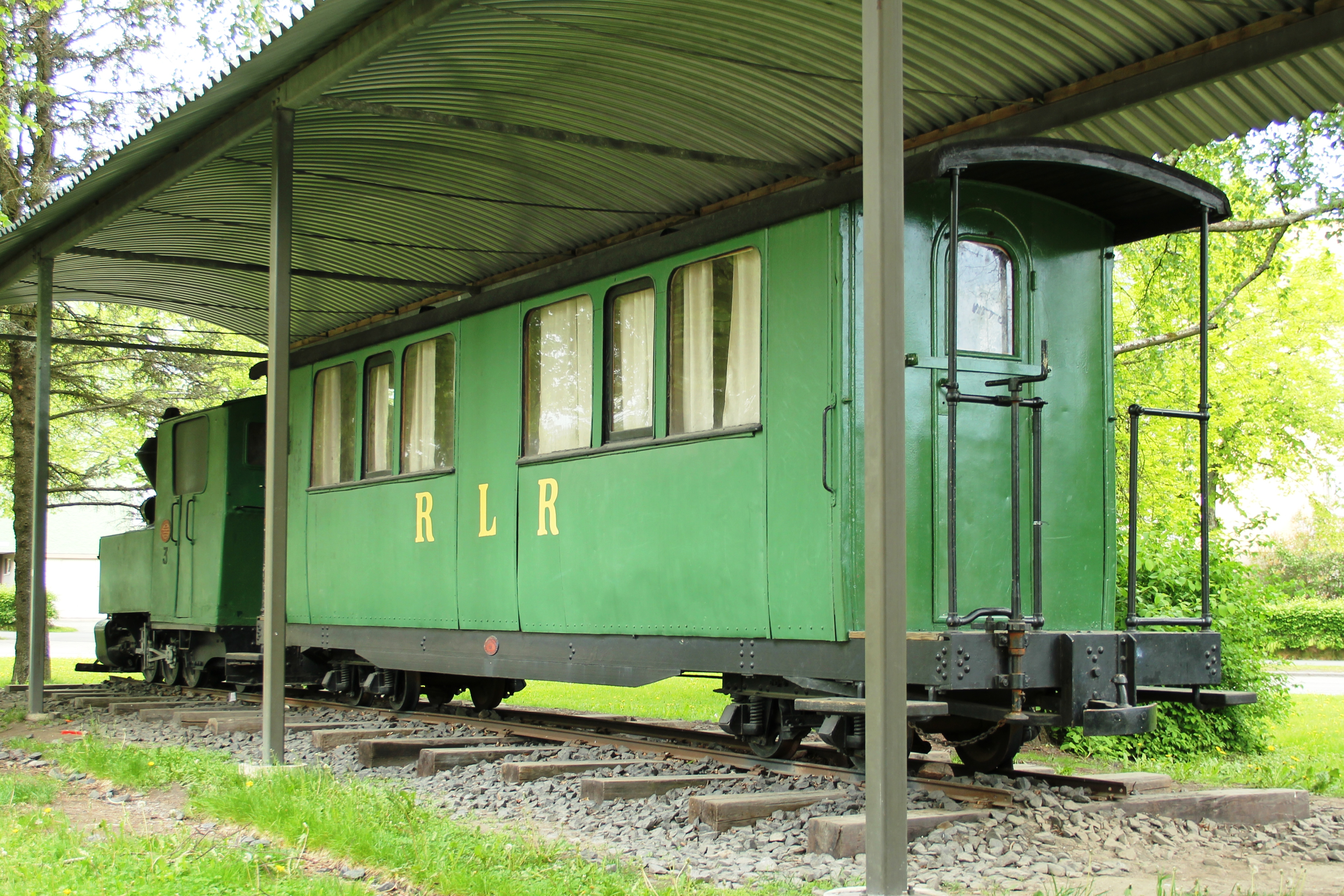 Riihimäen-Lopen rautatien museoitua kalustoa Riihimäen palolaitoksen edessä. Veturi nro 3 ja vaunu, Paloheimonkadun ja Kulmalan puistokadun kulmassa